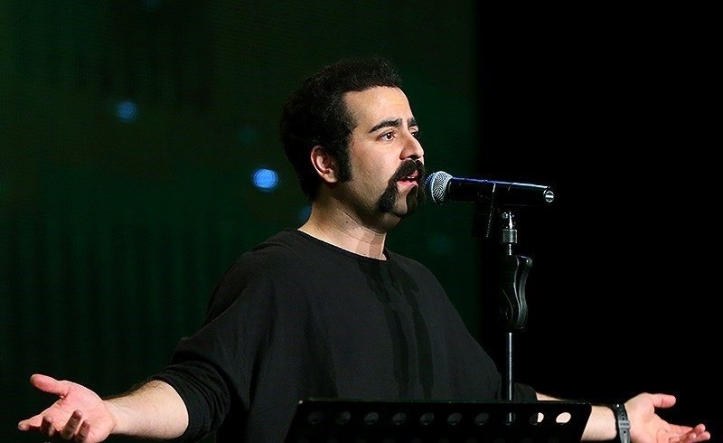 امید نعمتی، از اعضای گروه پالت